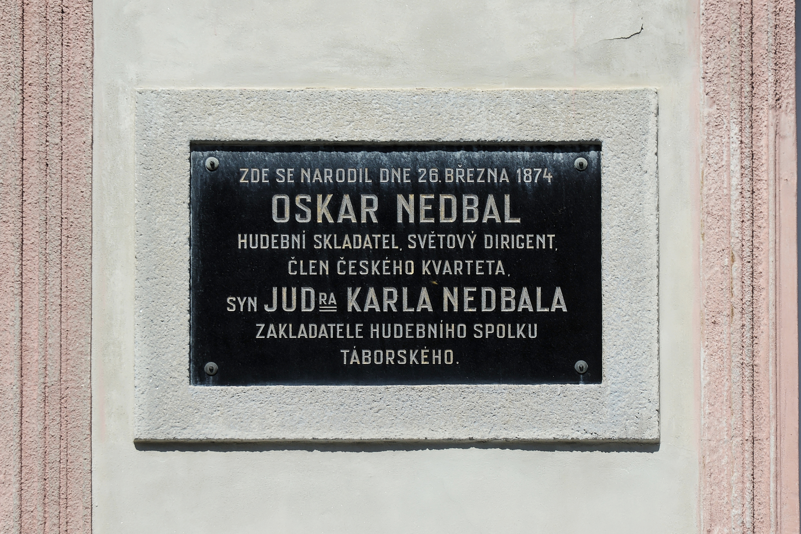 Tábor, Palackého ulice čp. 355, pamětní deska Oskara Nedbala na jeho rodném domě. Text: Zde se narodil dne 26. března 1874 Oskar Nedbal hudební skladatel, světový dirigent, člen Českého kvarteta syn JUDra Karla Nedbala zakladatele hudebního spolku táborského.